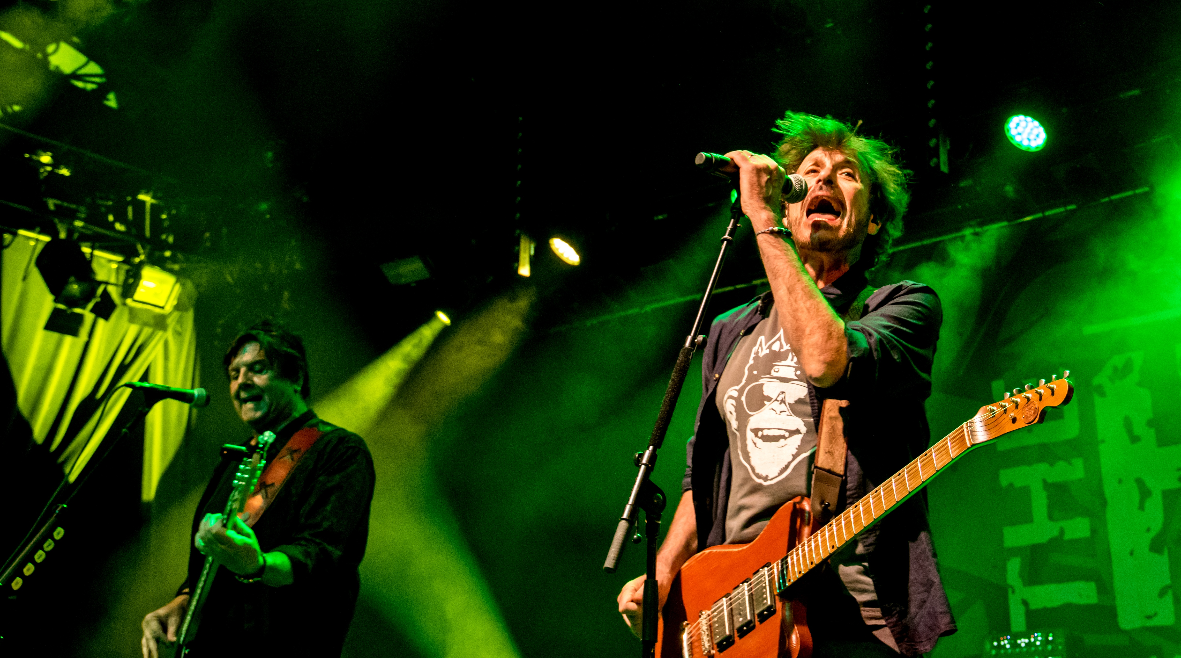 Bilder vom Zelt Musik Festival 2018 in Freiburg im Breisgau Auftritt The Hooters am 26. Juli 2018 im Zirkuszelt